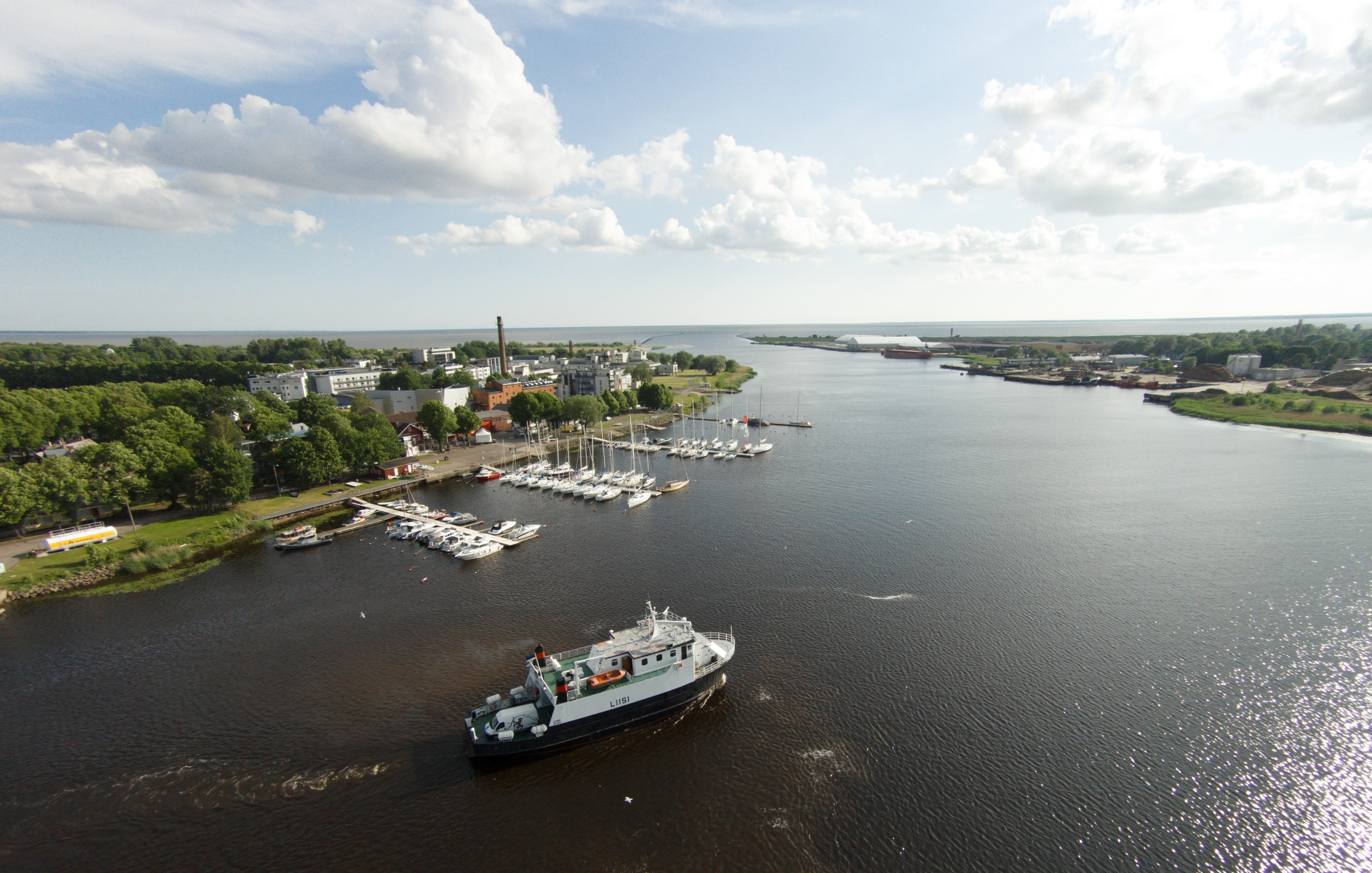 Parvlaev Liisi väljumas Pärnu-Kihnu liinireisile